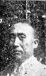 사업가 옥관빈